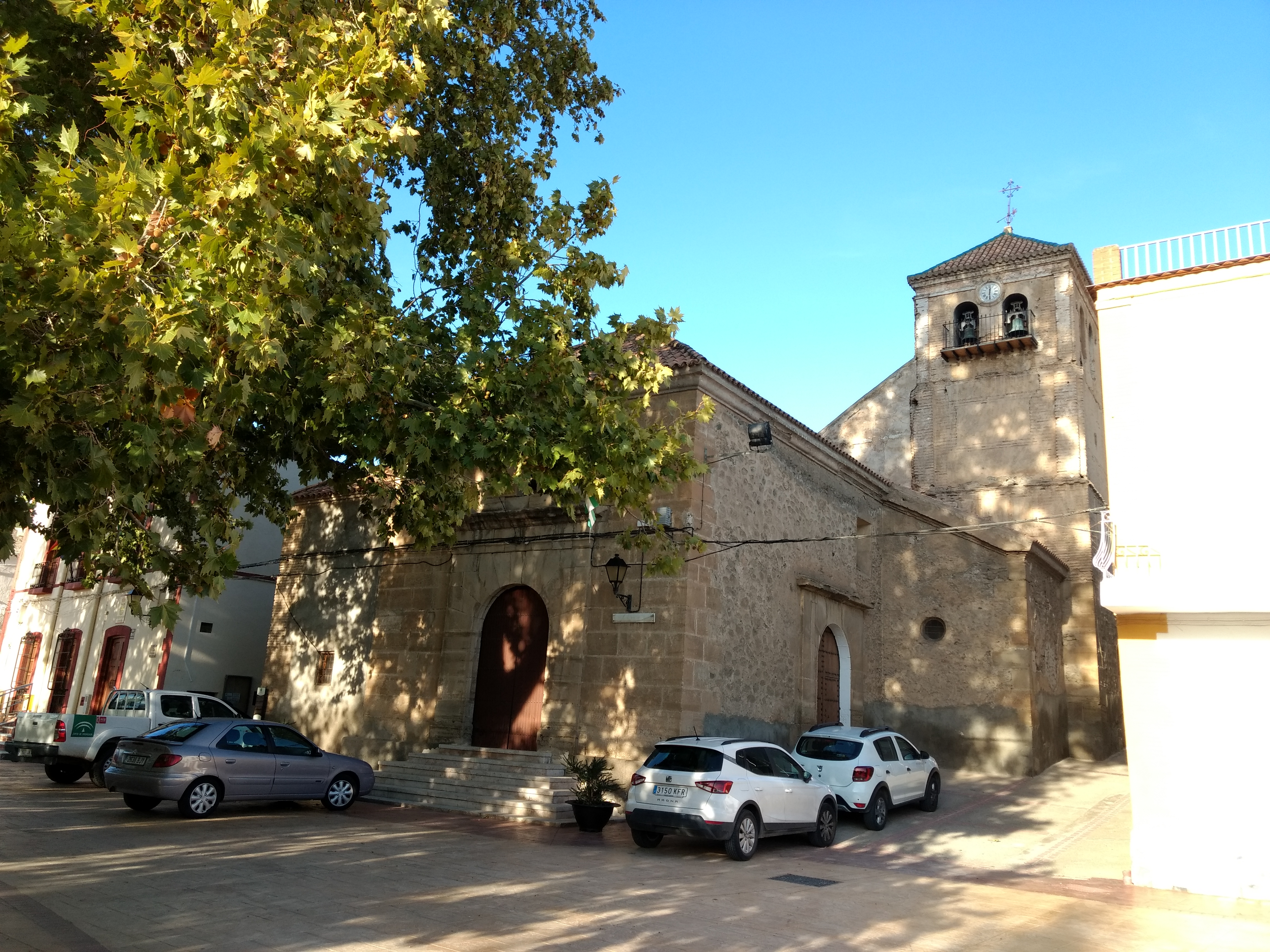 Iglesia de Santa María, siglo XVI, Santa Cruz de Marchena, Almería